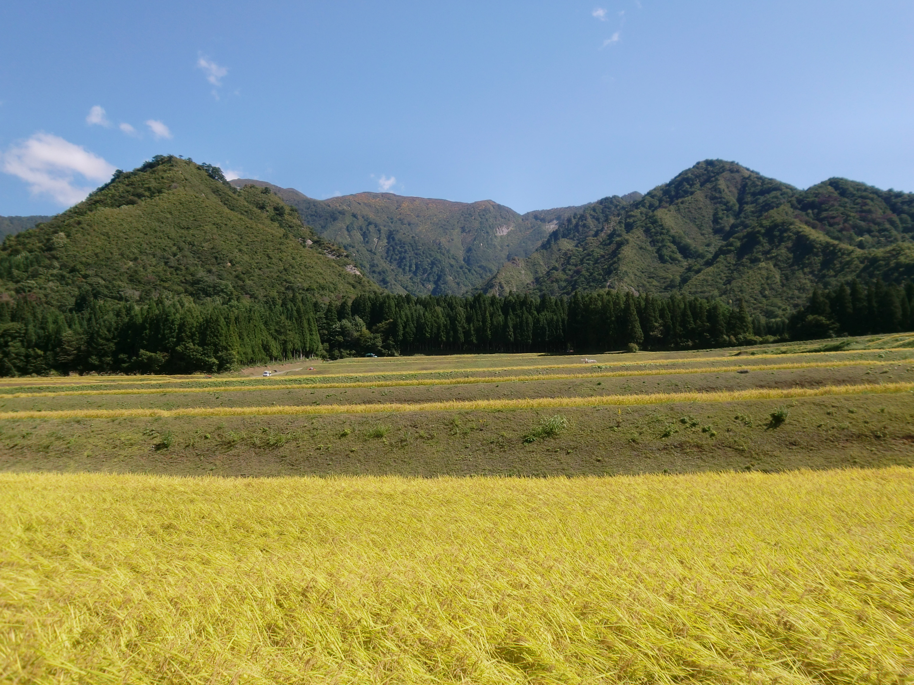 魚沼産コシヒカリ 塩沢産 （日本百名山 巻機山と古峰山を望む、標高400mの栽培地帯）